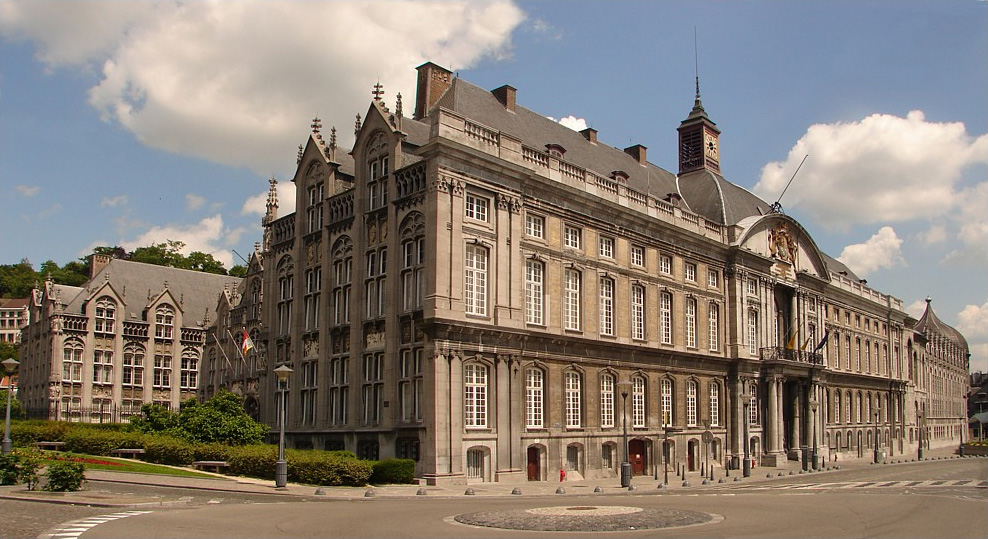 het paleis van de prins-bisschoppen te Luik